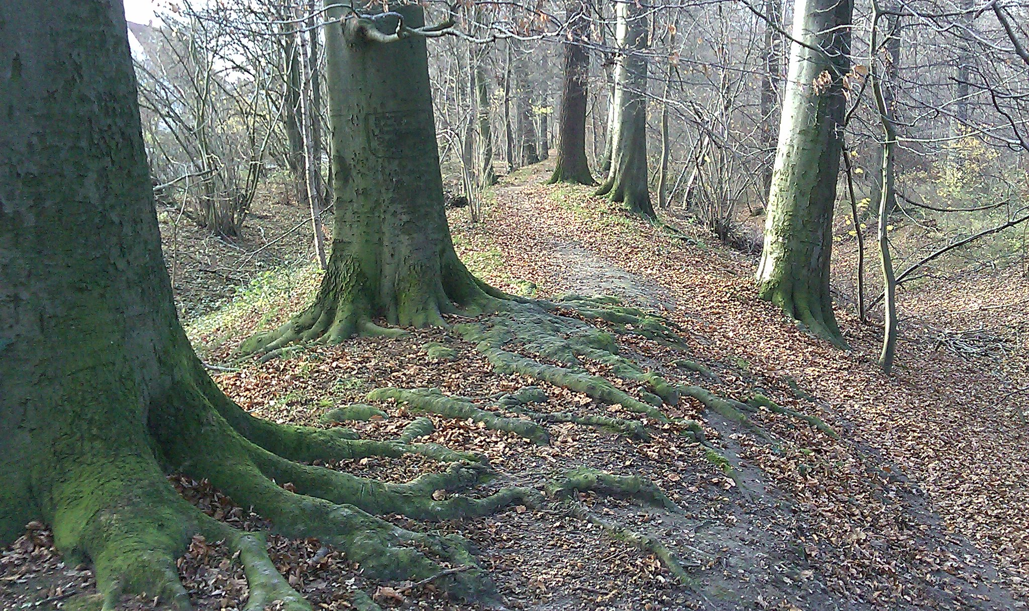 Historische Überreste der Braunschweiger Landwehr